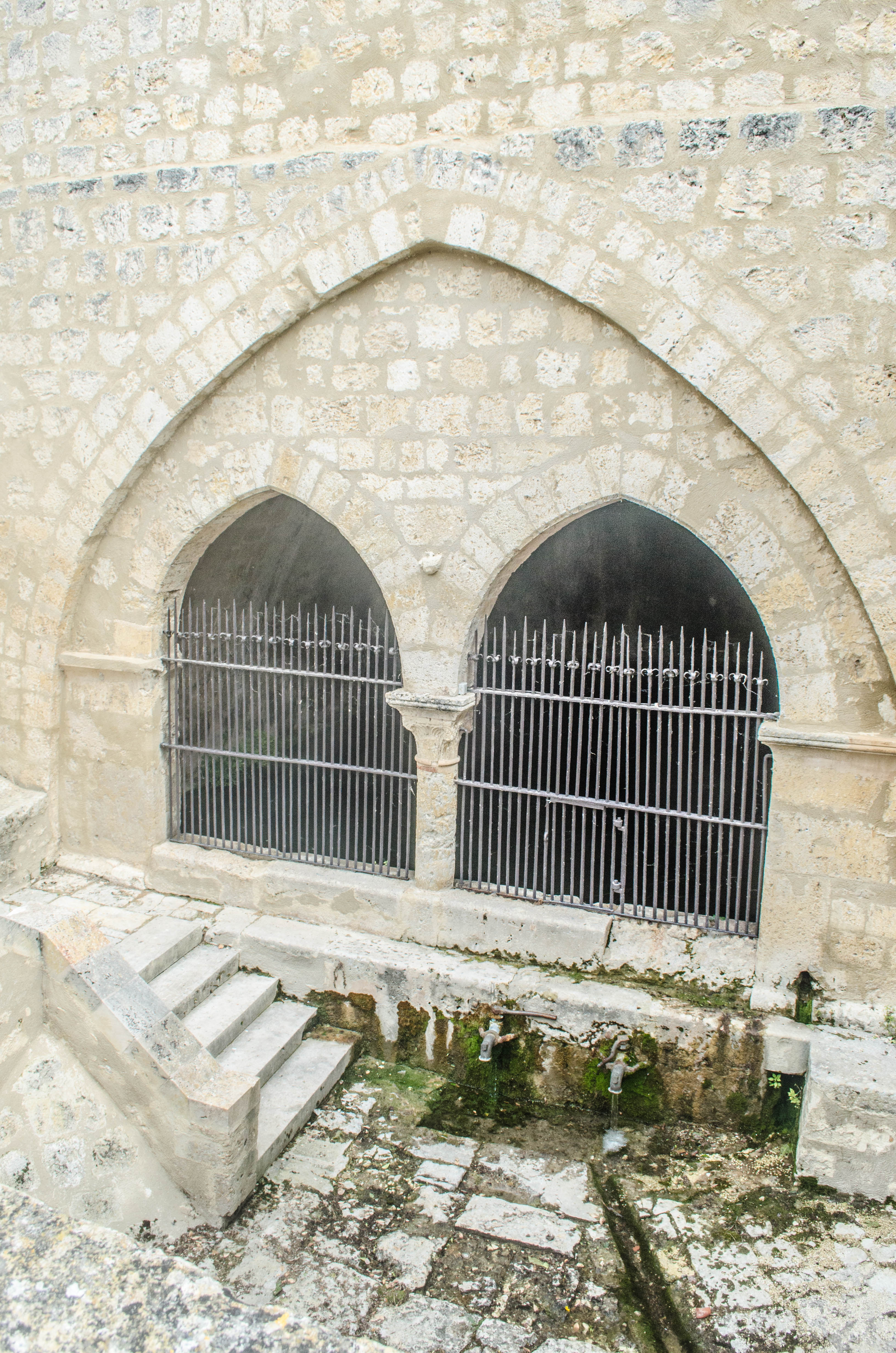 Fontaine Diane ou Hountélie (XIIIe s), à Lectoure, Gers, France